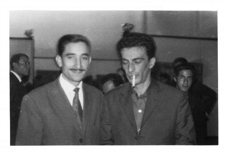 Kaddour M'Hamsadji (à gauche) avec Kateb Yacine (à droite) lors du salon du livre d'Alger à la salle Ibn Khaldoune